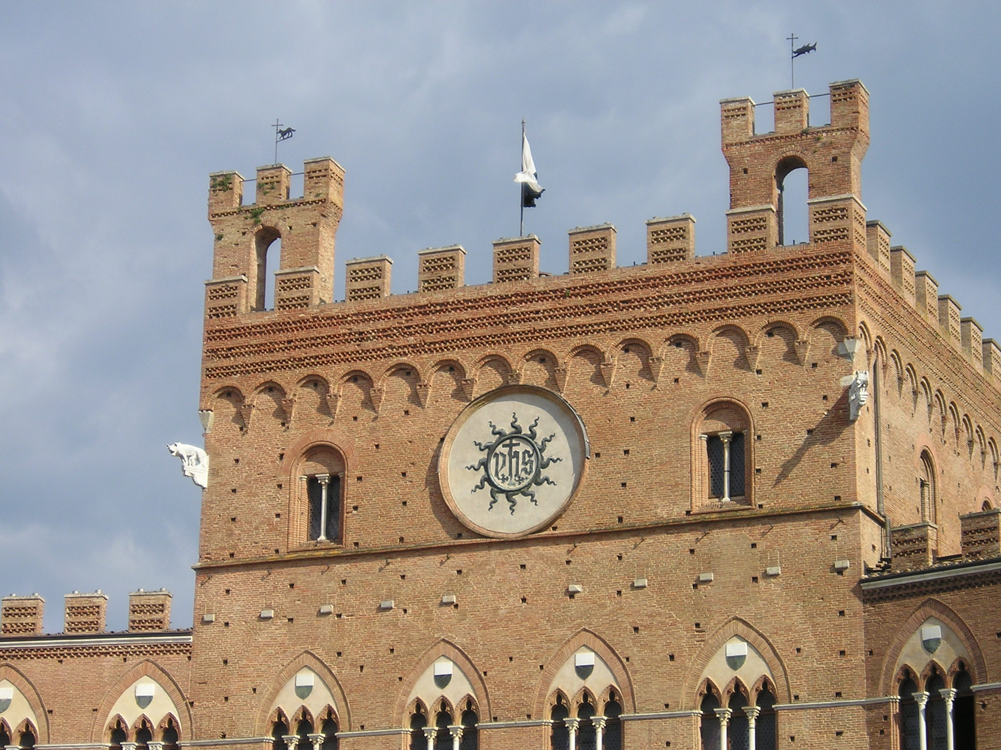 Particolare Palazzo Comunale, Siena